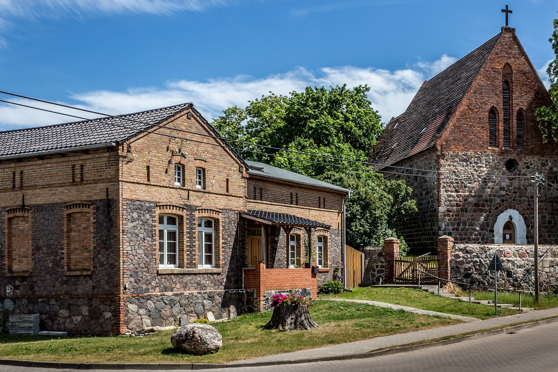 Hohenlandin Dorfstraße 18 Dorfschule